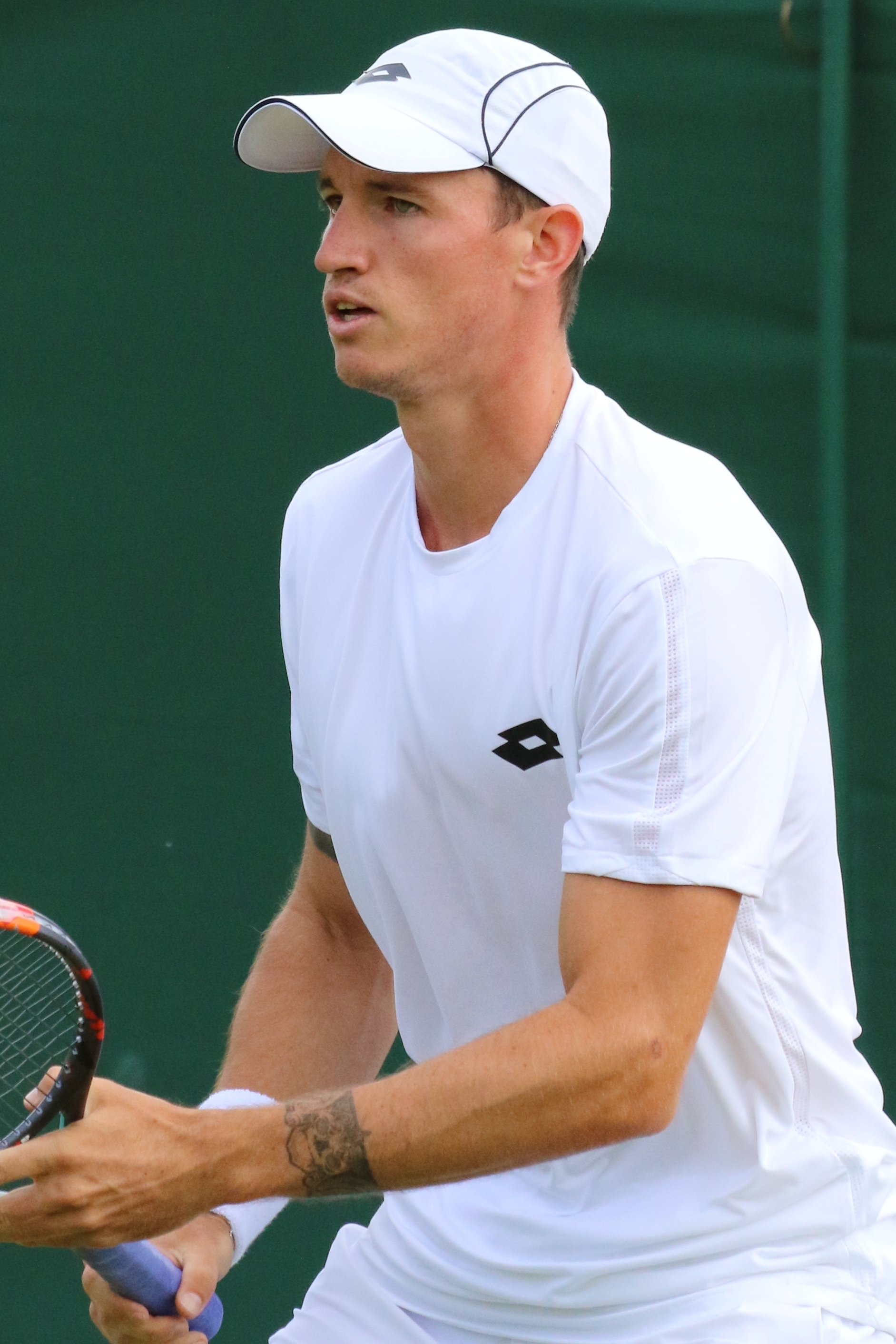 Novak WMQ16 (19)